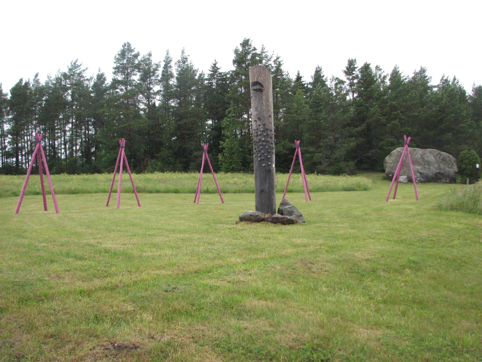 Tubala boulder, Estonia